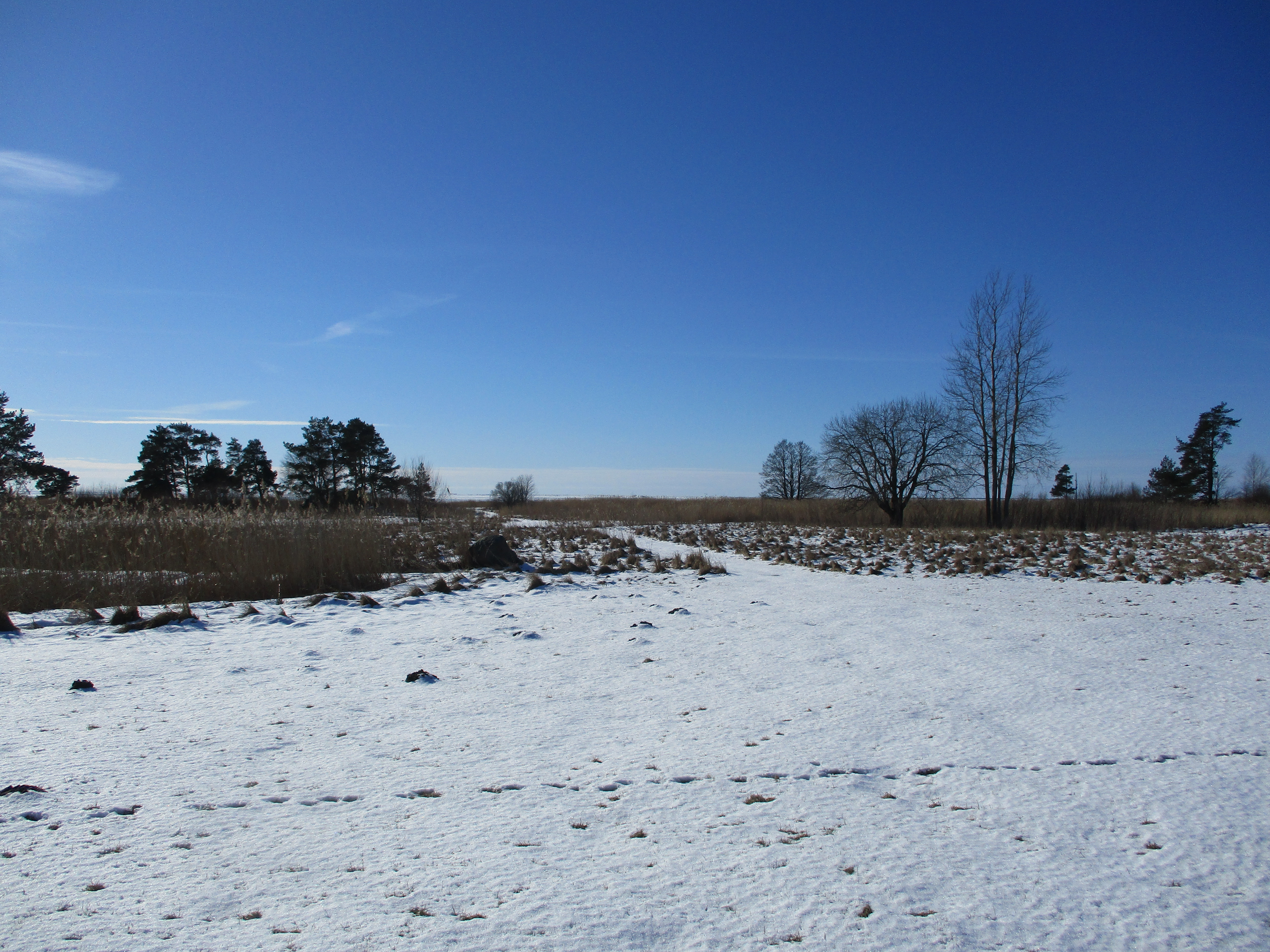 Vaade mõiskeskusest edelasse, Liivi lahele.